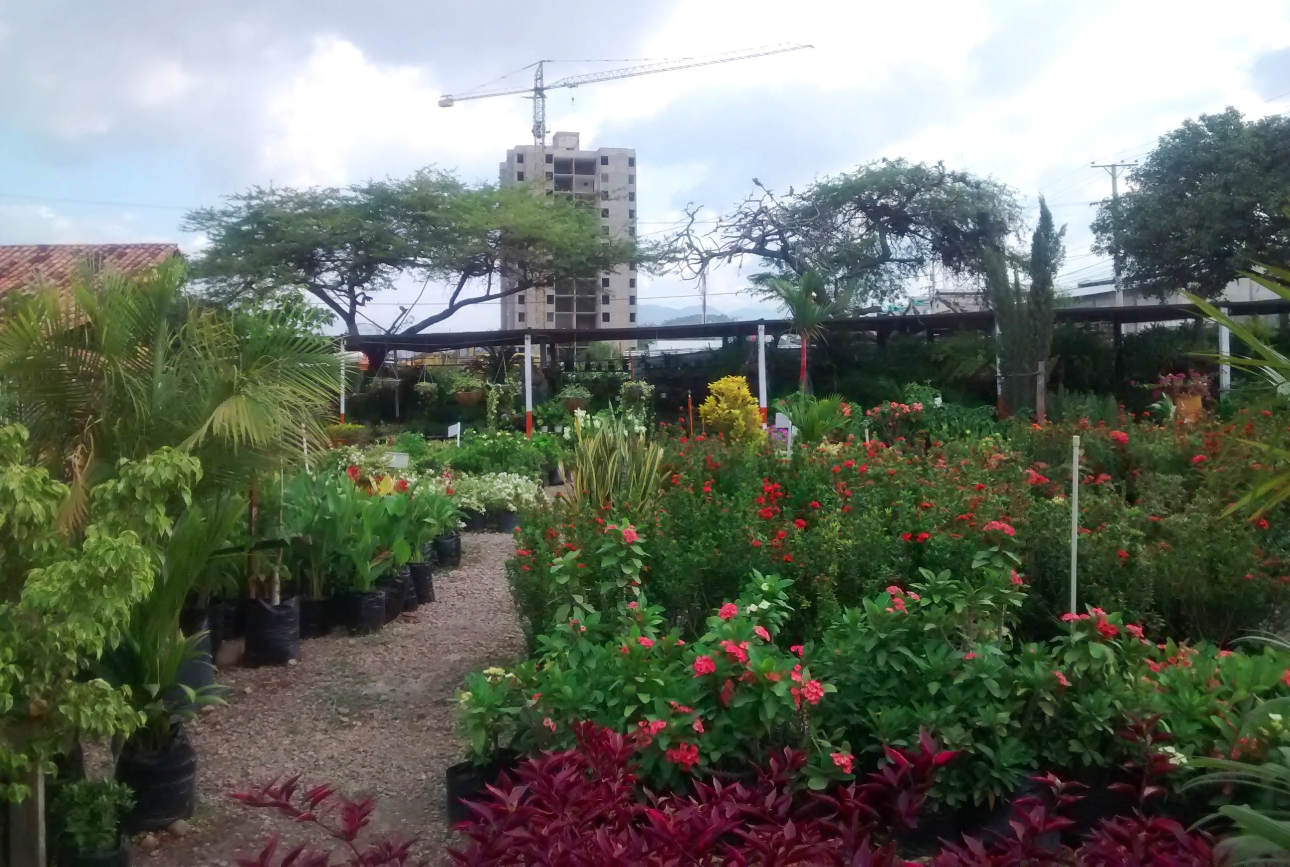 Edificio en construccion y vegetación